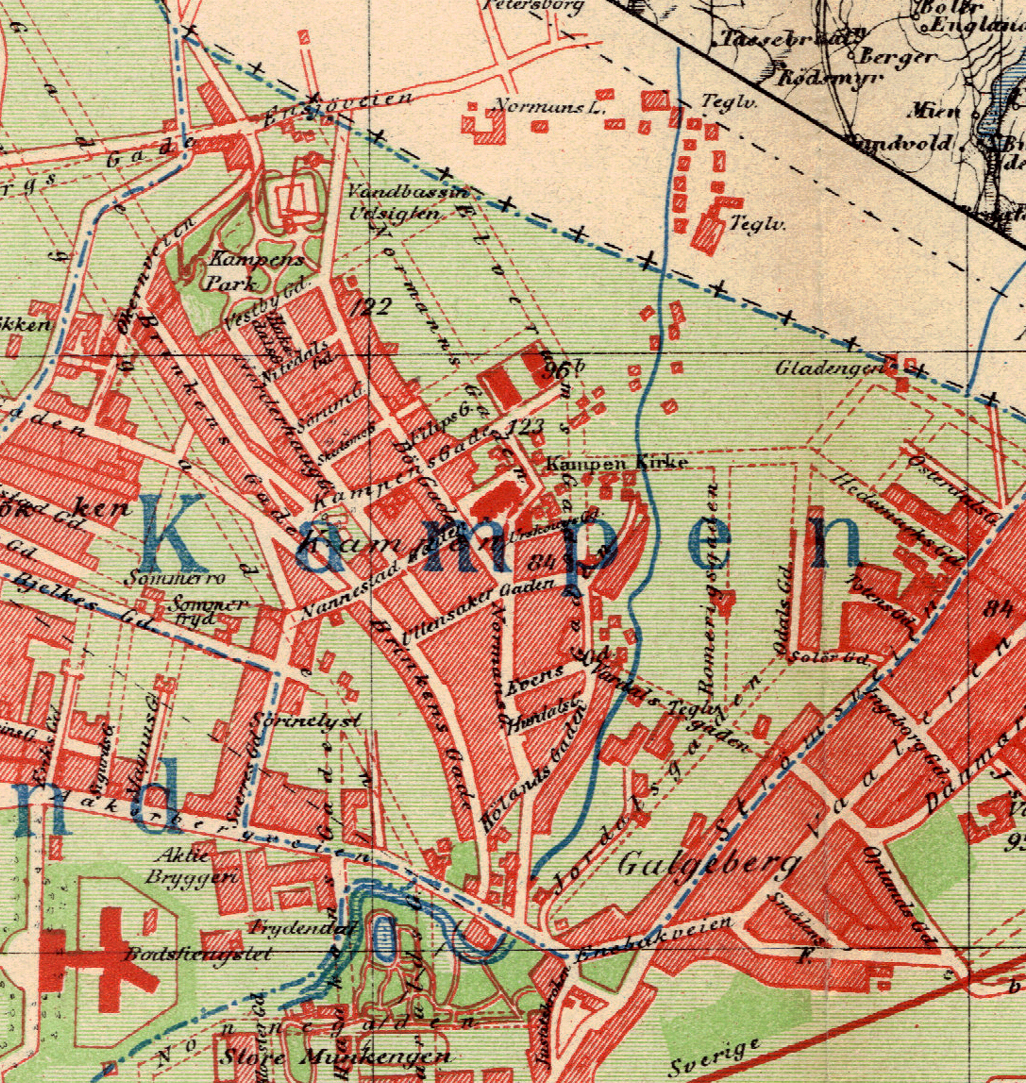 Kampen, Oslo.